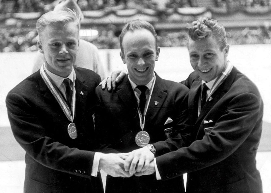 Toralf Engan, Veikko Kankkonen and Torgeir Brandtzaeg, 1964 Olympics